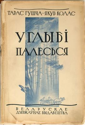 Беларуская (тарашкевіца): Вокладка першага выданьня другой кнігі Трылёгіі «У глыбі Палесься» (Вільня, 1927)